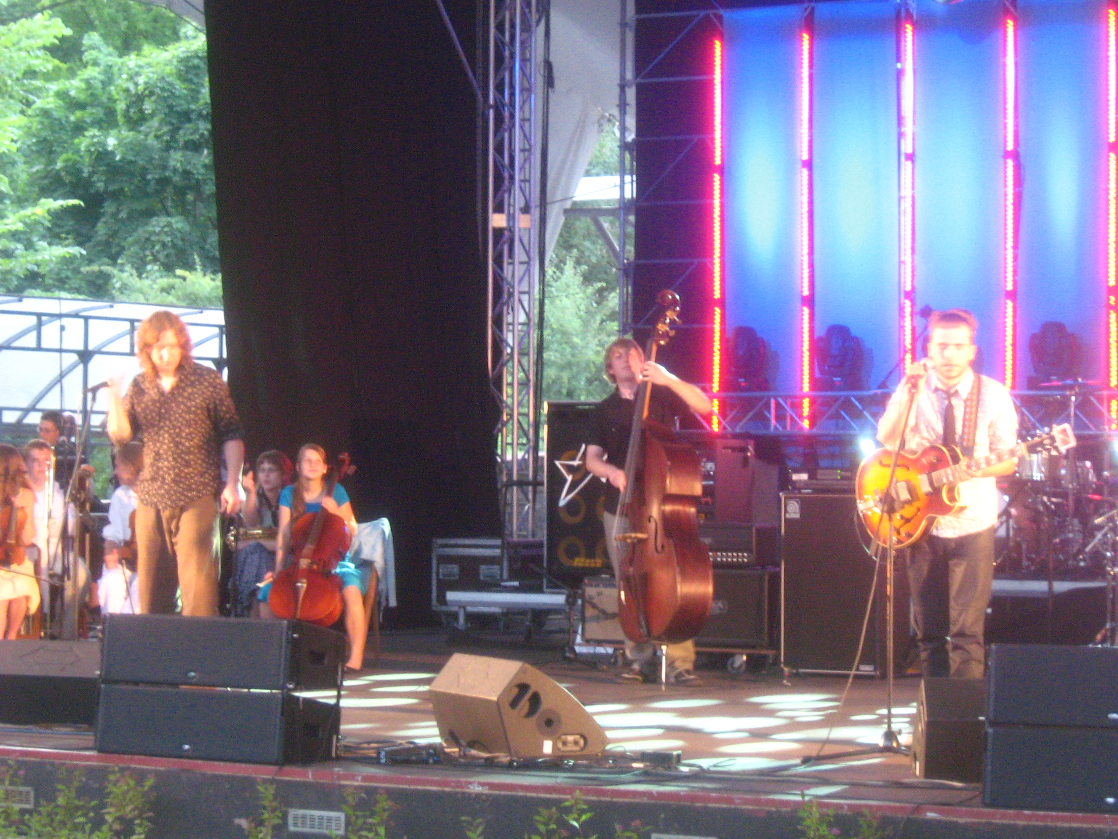 Grupa muzyczna Limbo podczas finałowego koncertu GRAMY 2008 w Tearze Letnim w Szczecinie.